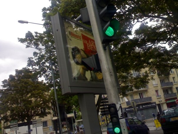 Rue de Caen avec une affiche consacrée à l'expo Sir Arthur Benton